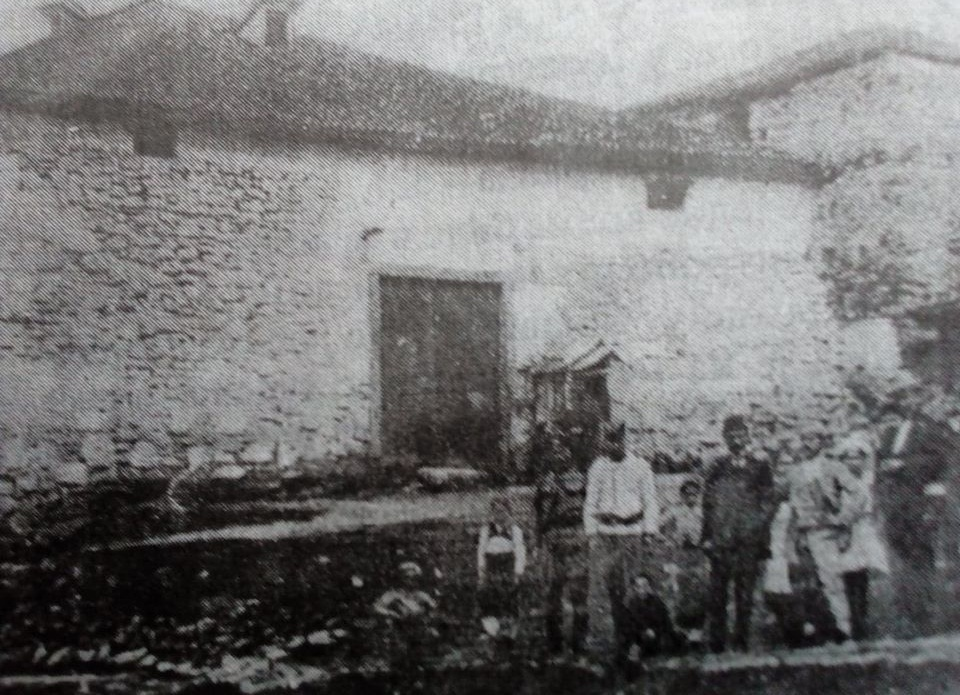 Vojinovića kula (snimak iz 1913)